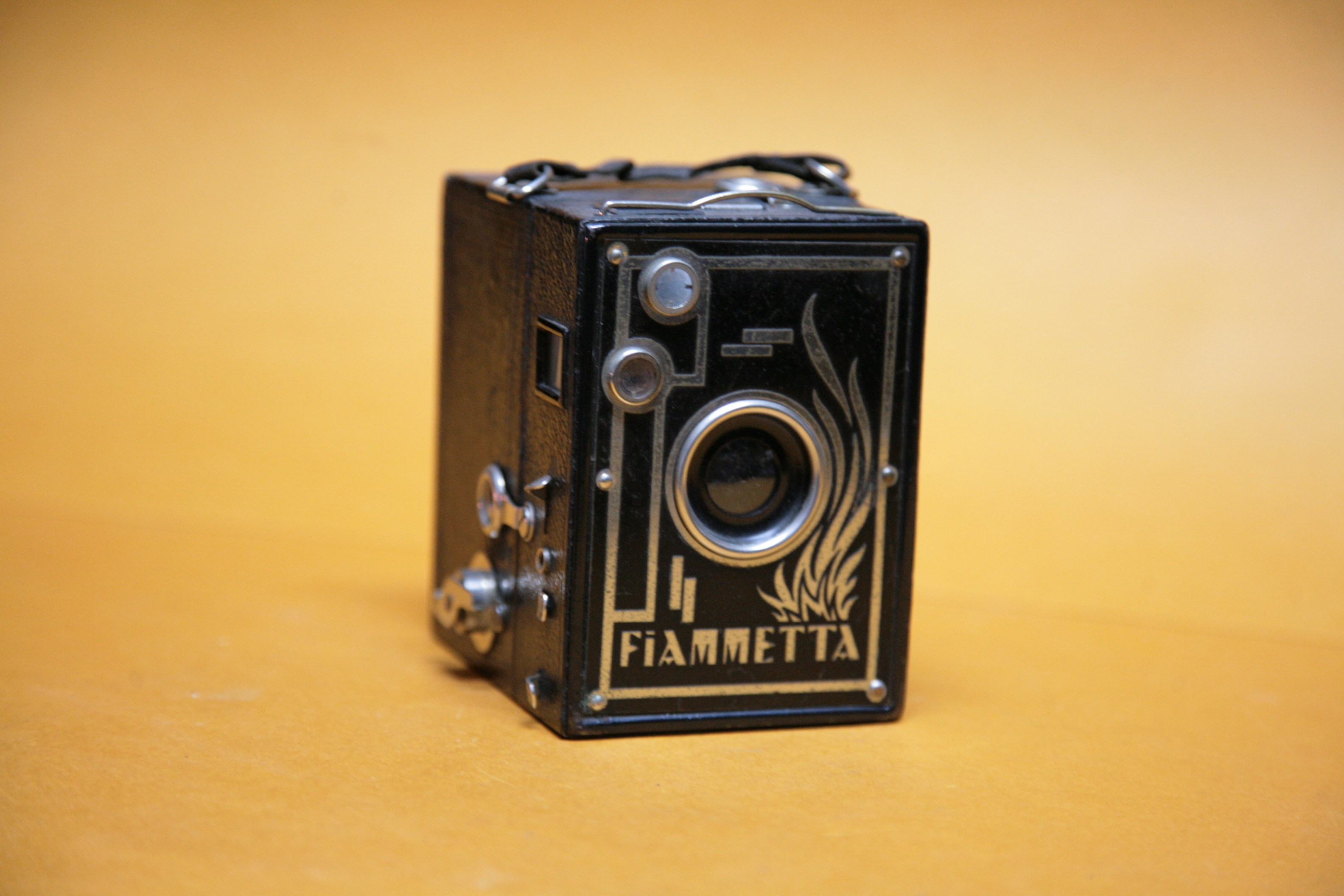 Fotocamera Fiammetta 1930 costruita a Firenze dalla FIAMMA; tipo box formato 6x9 cm su film in rullo tipo 120, corpo in lamerino stampato e rivestito; doppi mirino a riflessione per inquadrature verticali e orizzontali e mirino estraibile, obiettivo estraibile a fuoco fisso a menisco. Regolazione su tre diaframmi con otturatore a moto alternato per instantanee e pose, filtro disinseribile Appartenente alla collezione privata di Marcè Vincenzo a Caltanissetta